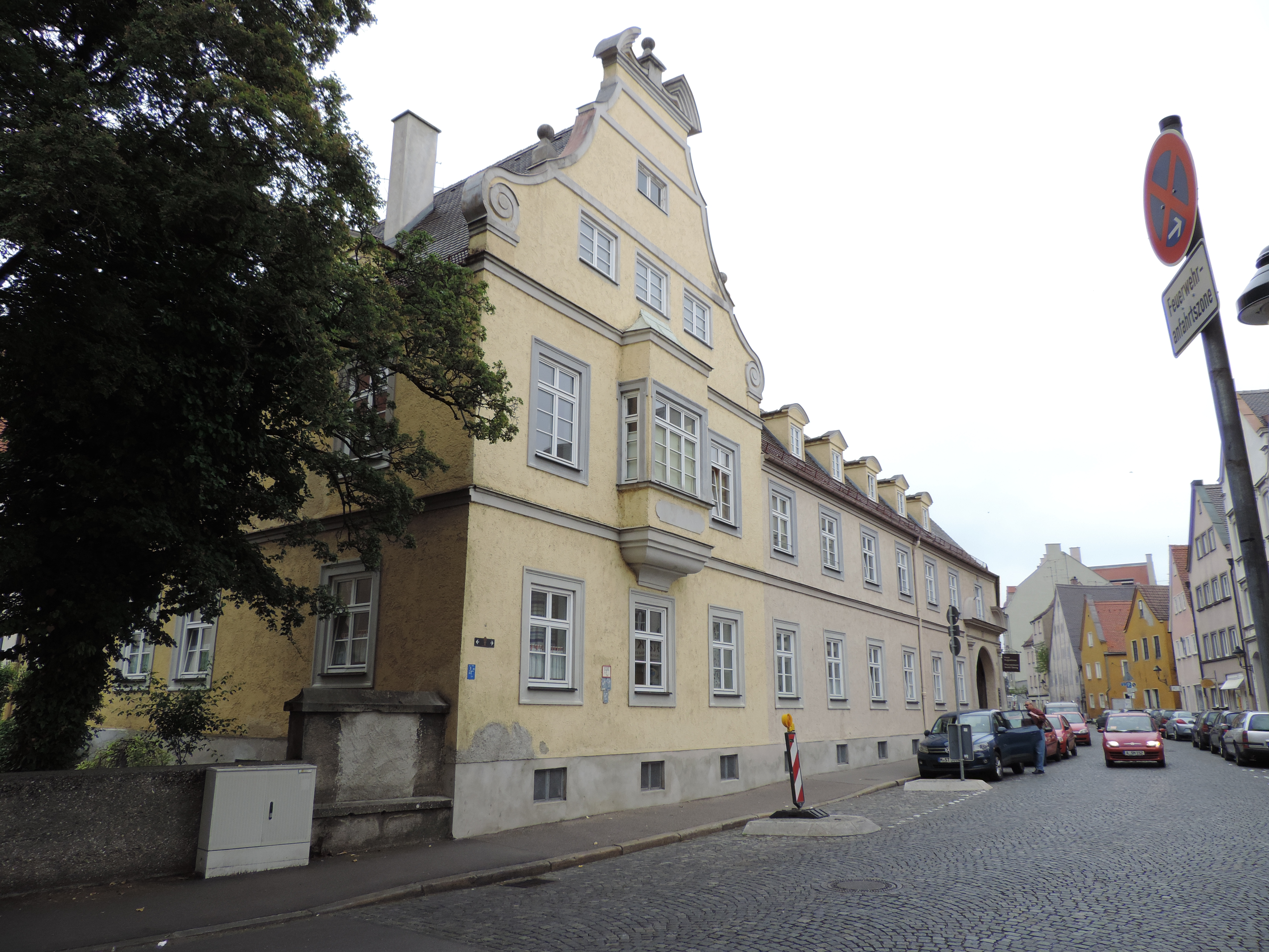 Ehemaliges Stiftsgebäude St. Georg